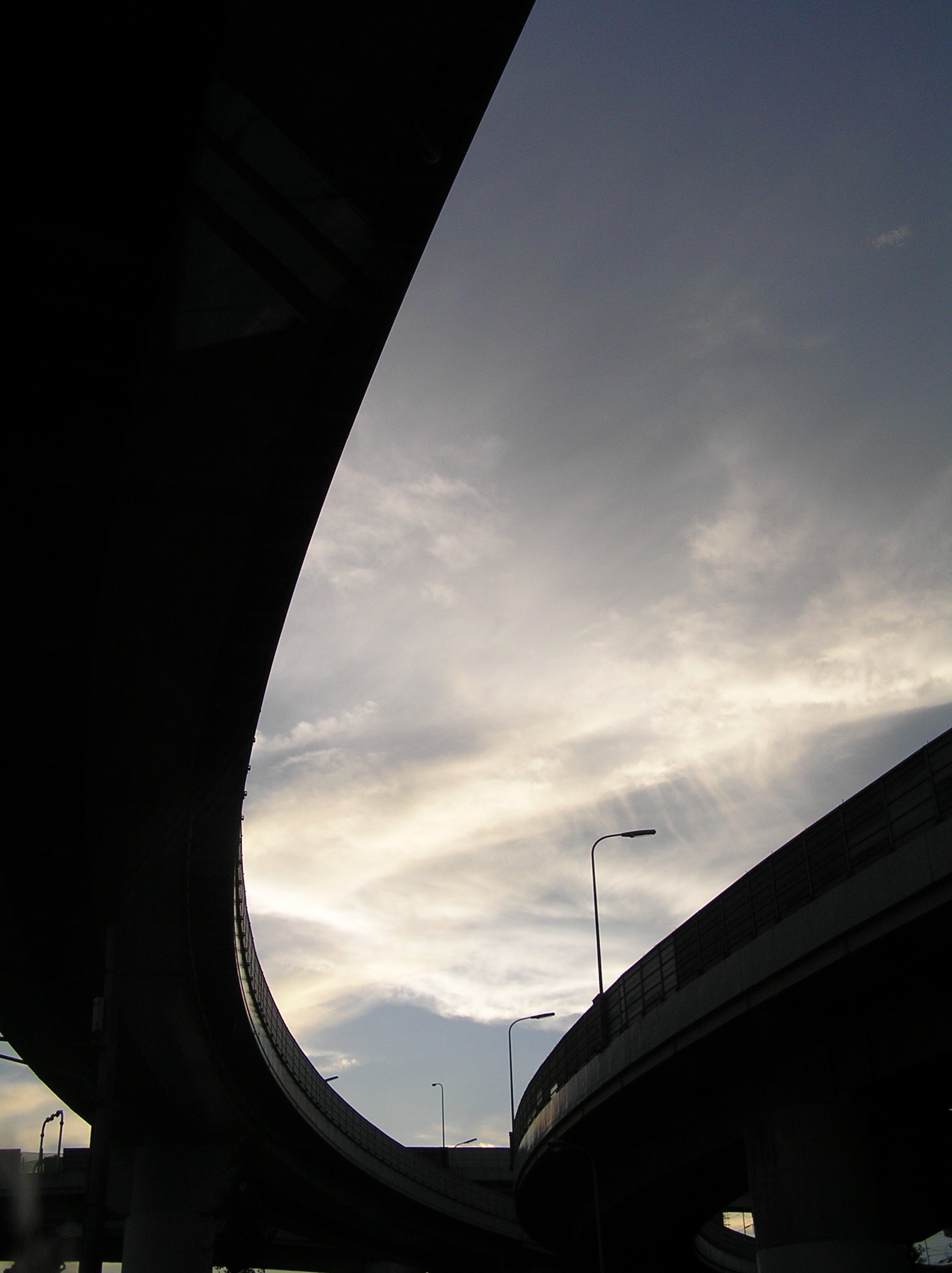 高速道路（大阪）